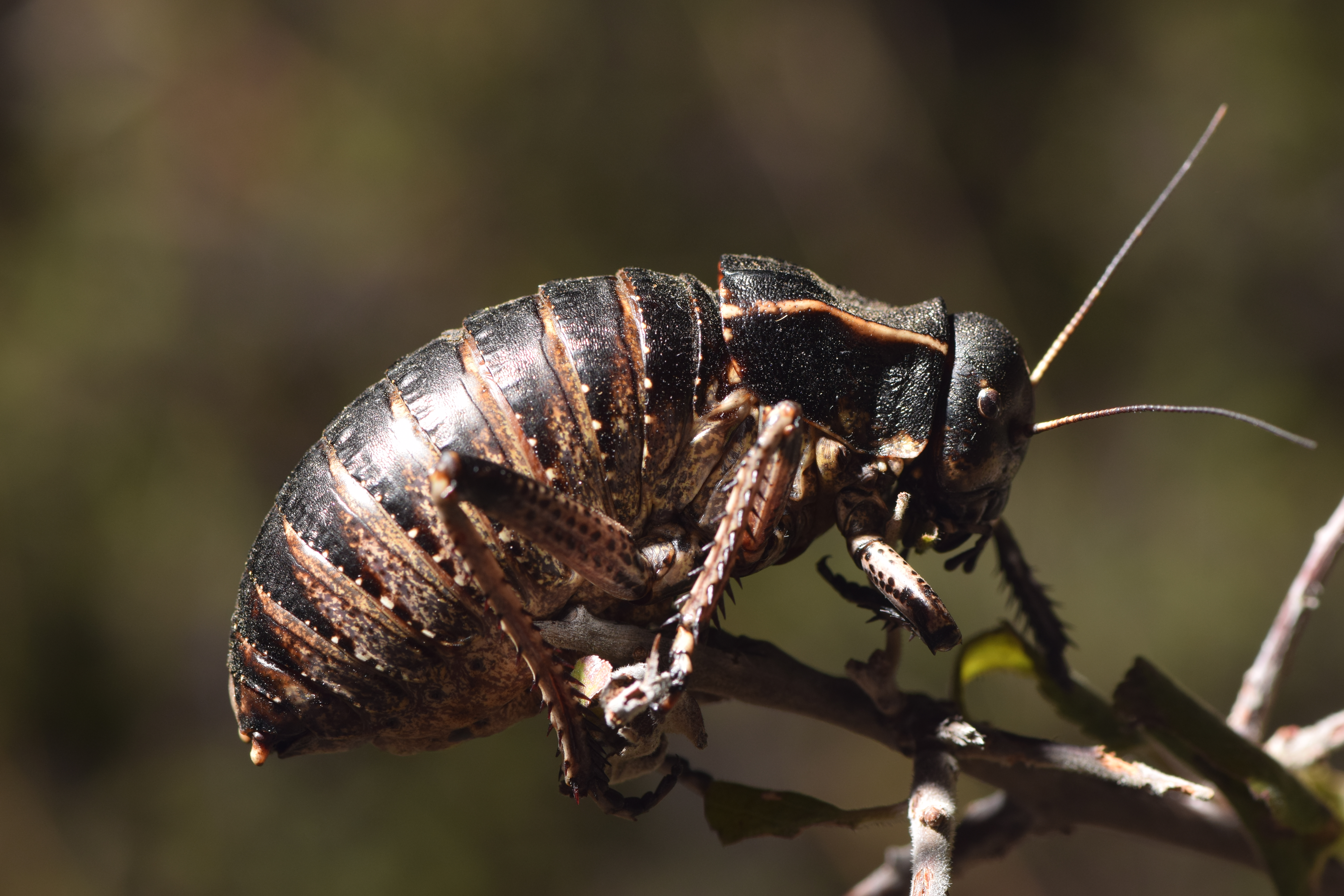 Mâle Bradyporus dasypus au sommet d'un buisson de nuit.